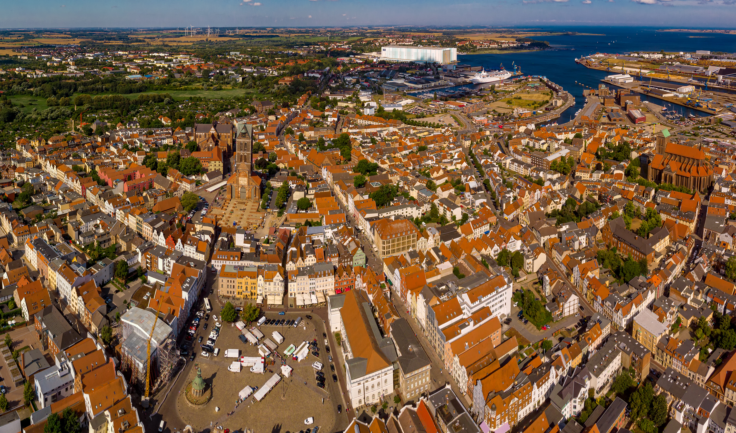 Innenstadt Wismar